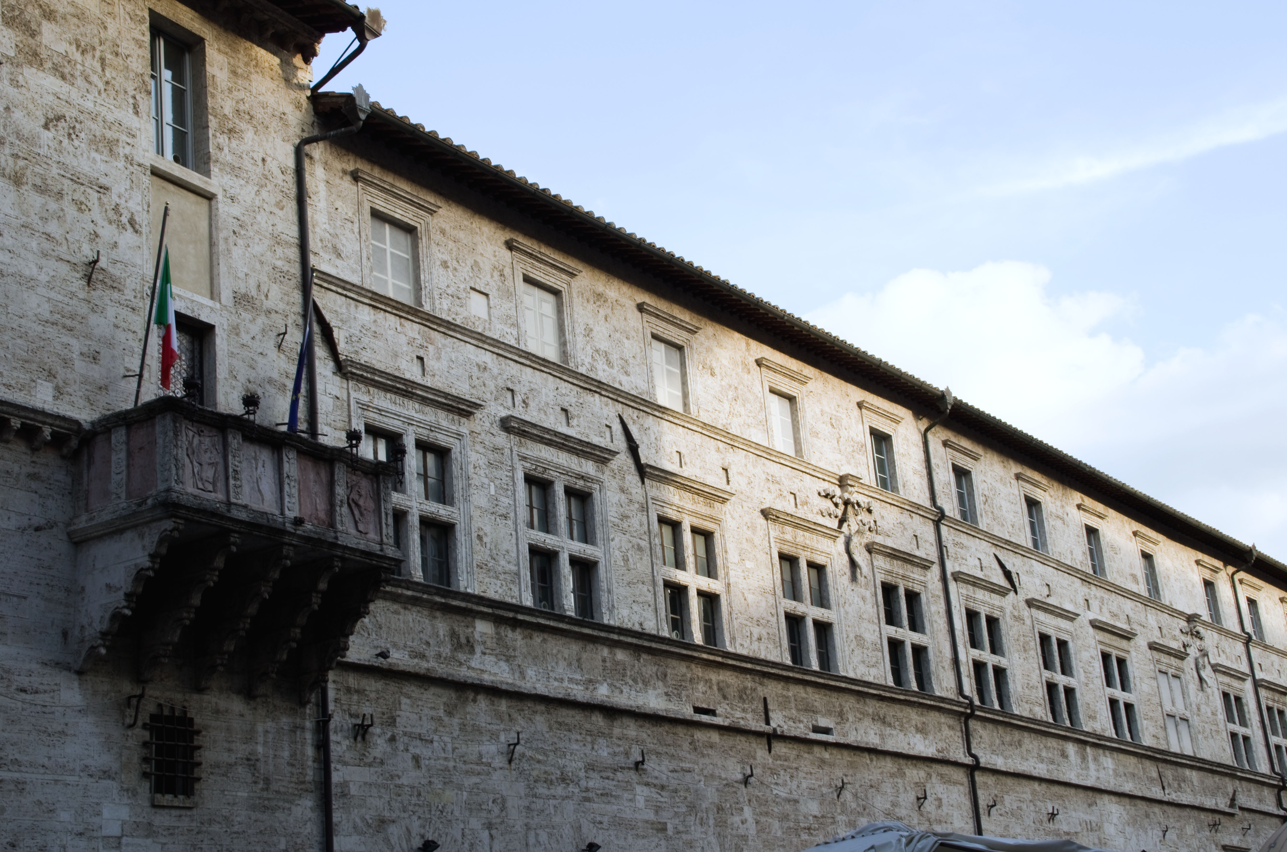 Palazzo del Capitano del Popolo This is a photo of a monument which is part of cultural heritage of Italy.